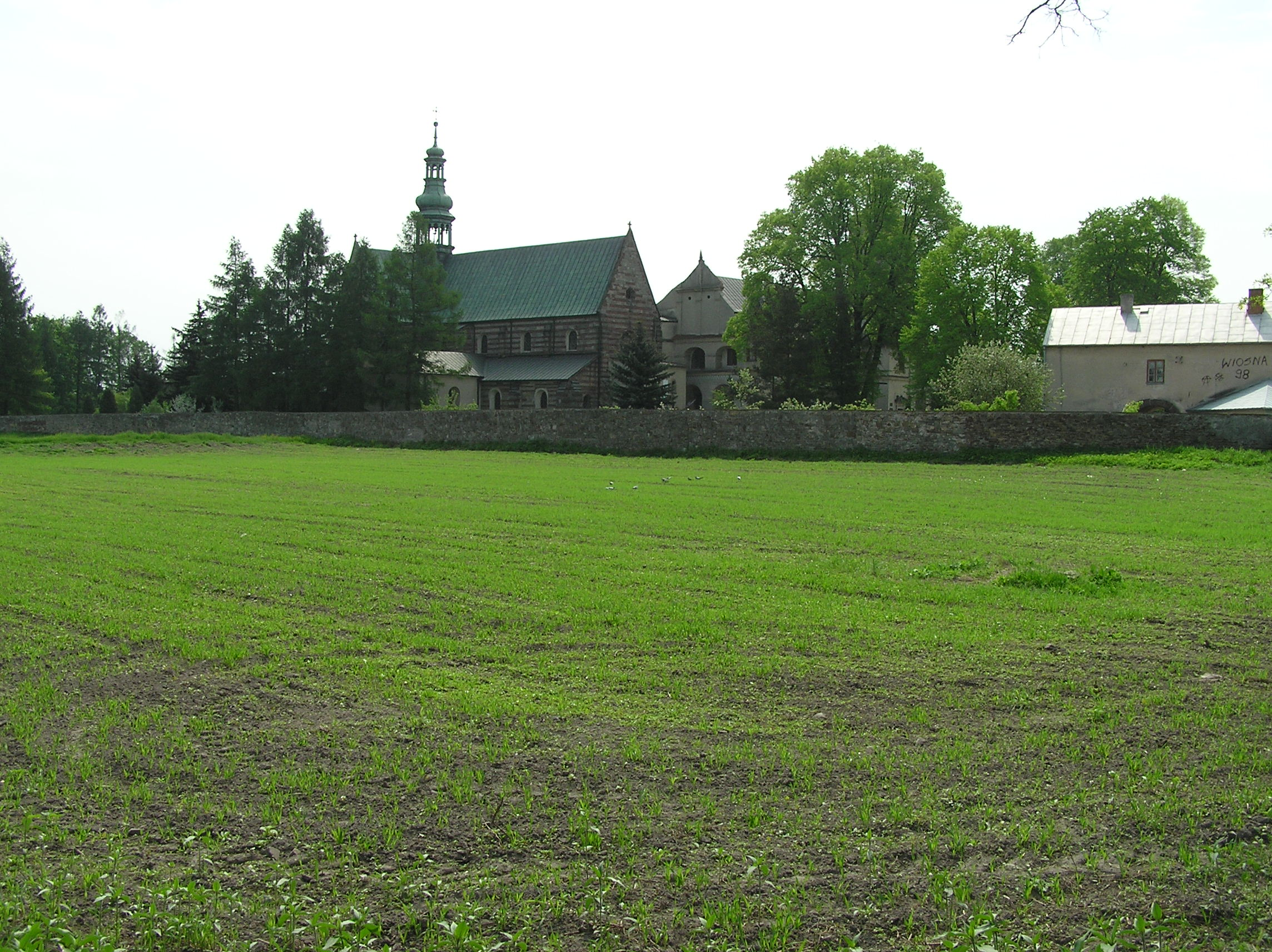 Opactwo w Wąchocku, kościół romański